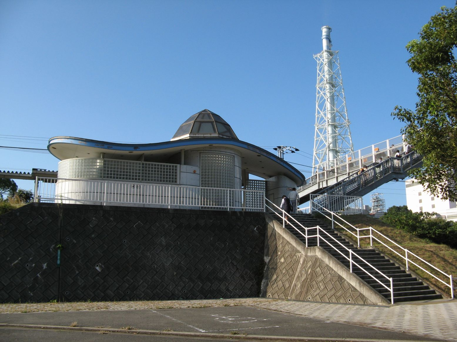 呉線 安芸長浜駅 背後に竹原火力発電所が見え、通勤者が跨線橋を渡っている